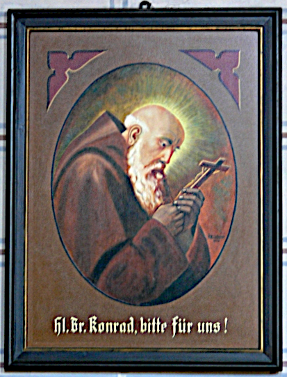 Pfarrkirche St. Margareta, Heimenkirch, Landkreis Lindau, Bayern Andachtsbild "Bruder Konrad" (Konrad von Parzham)